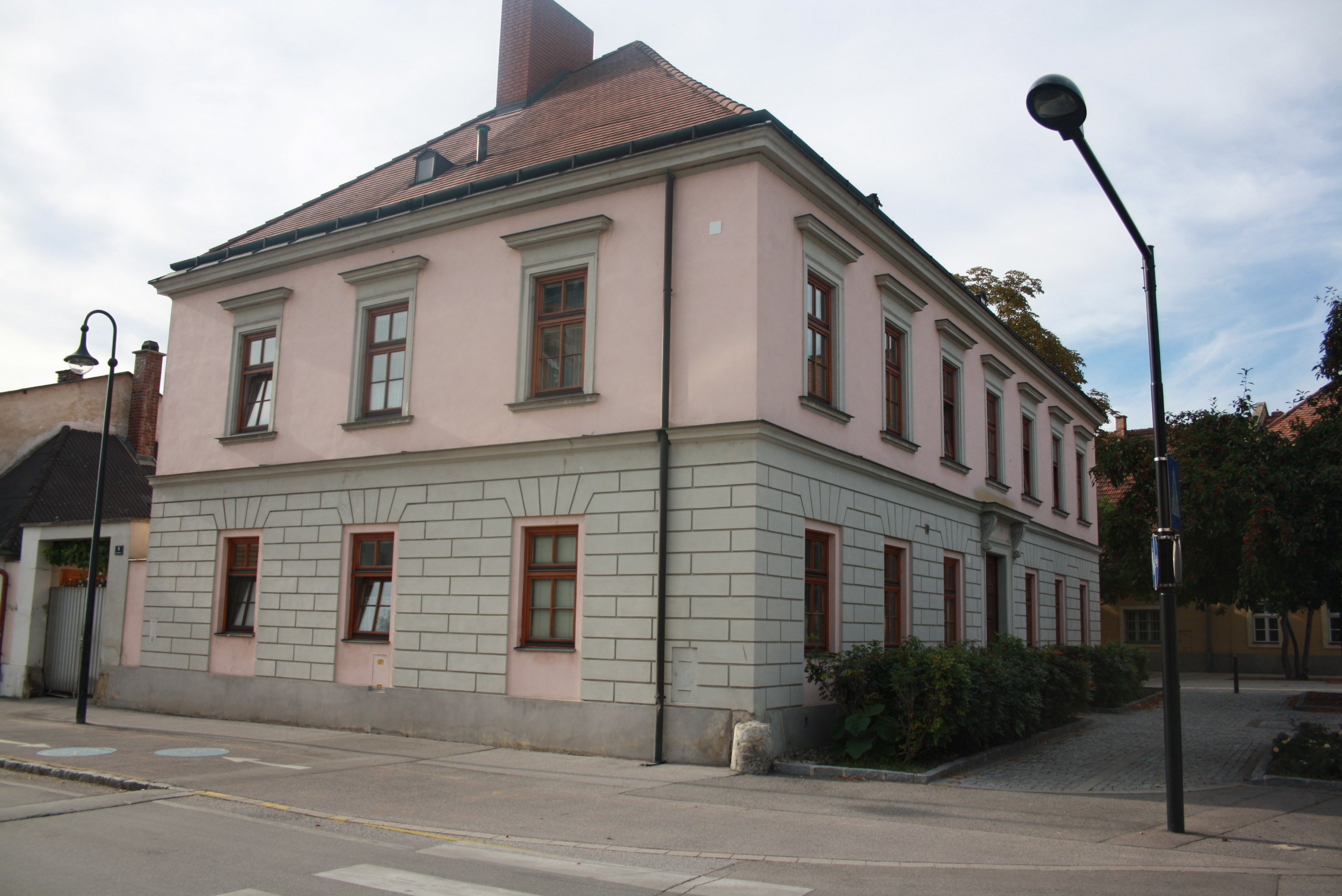 ehem. Bürgerspital, heute Wohnhaus in Stockerau